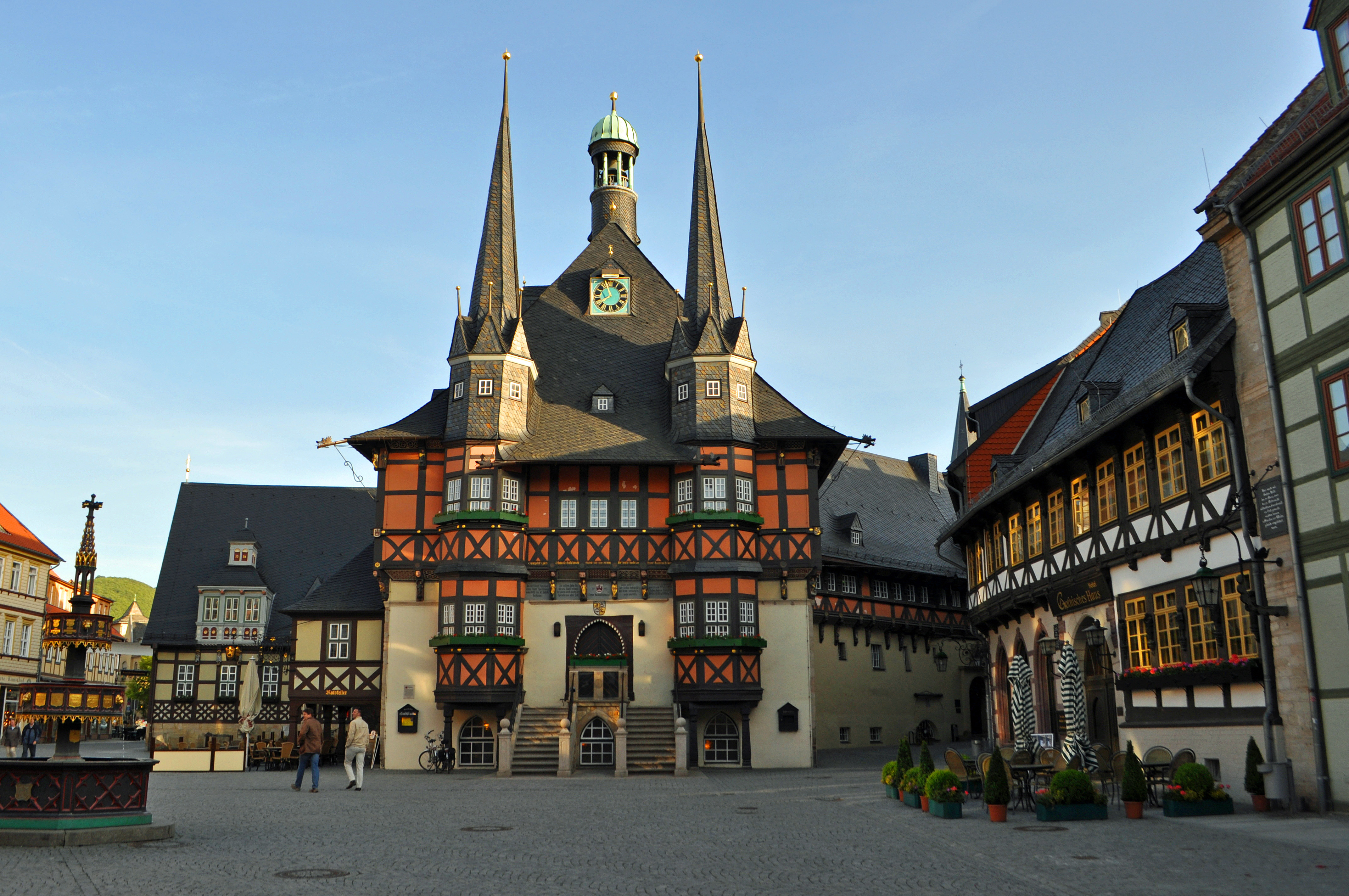 Das Rathaus in Wernigerode (Juni 2013). Gothisches Haus.